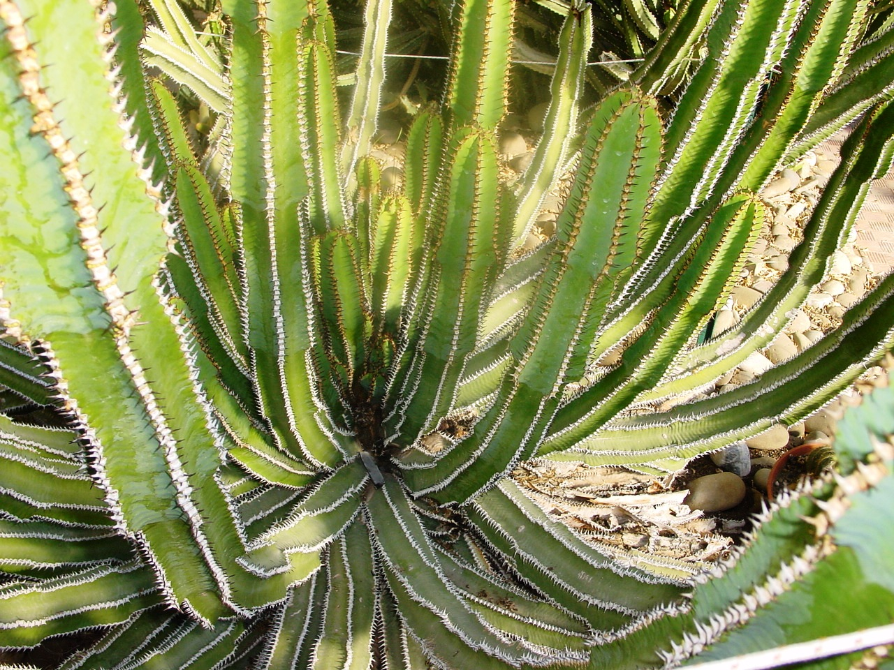 Botanical Garden, Palermo, 2006 Euphorbia avasmontana photo by tato grasso